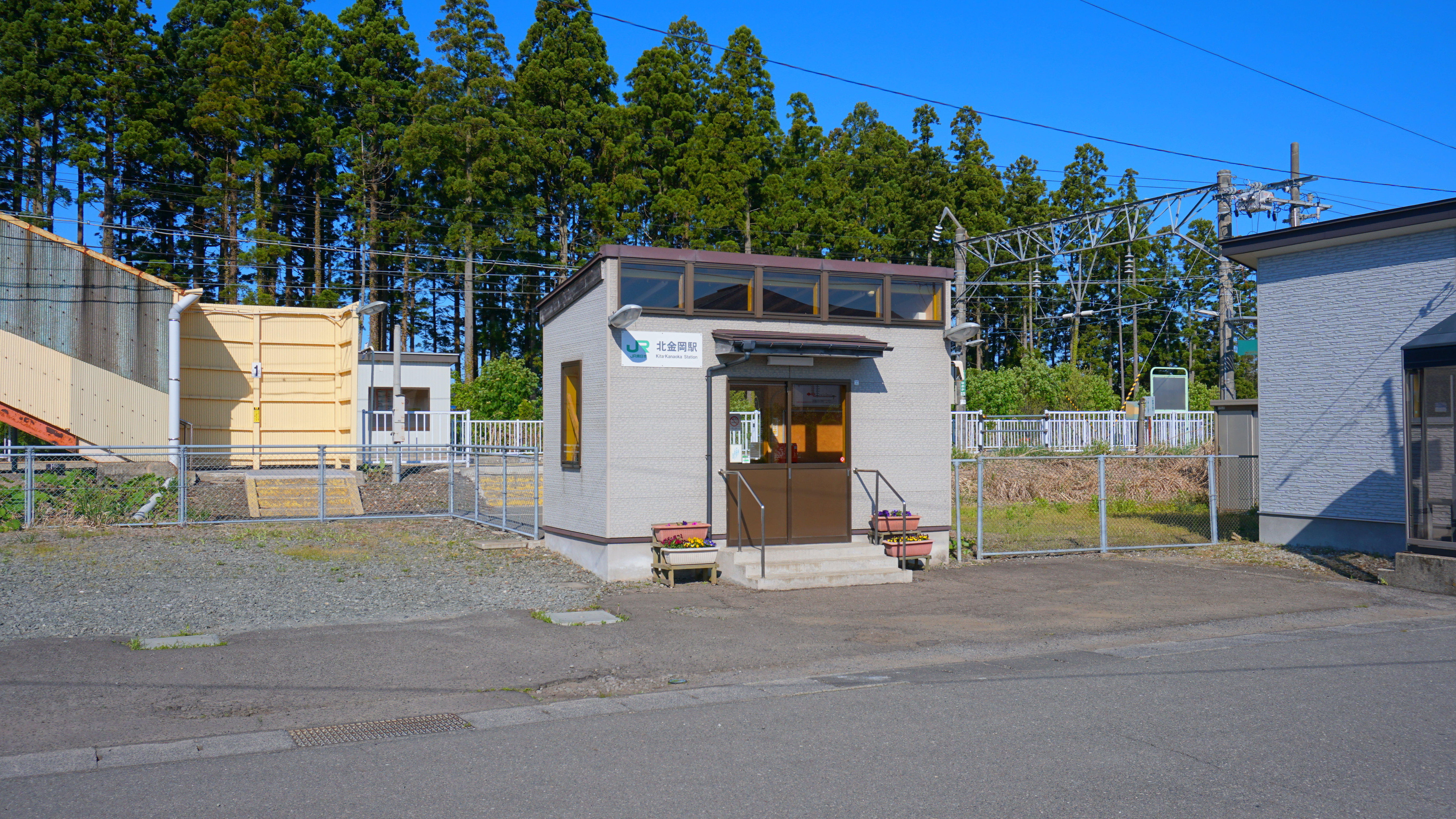 奥羽本線 北金岡駅